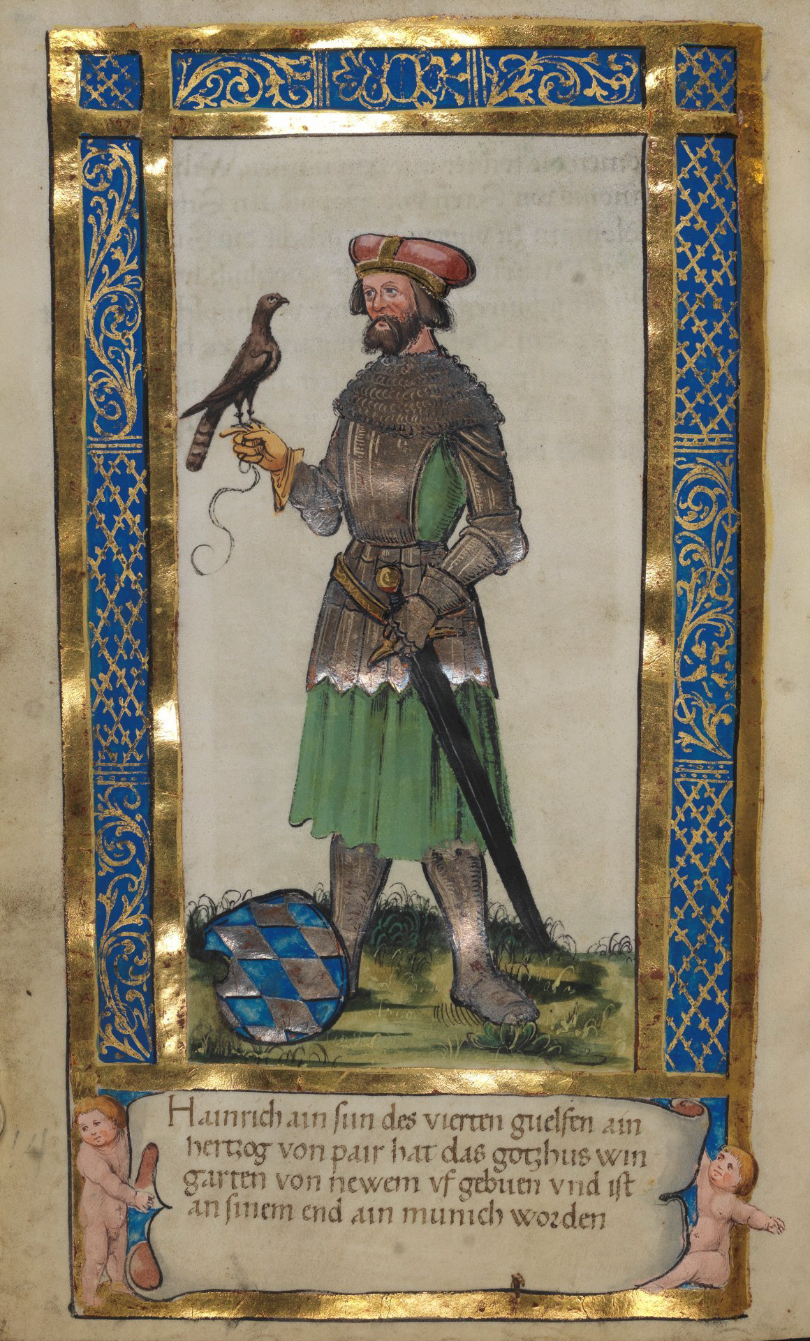 Weingartener Stifterbüchlein, Württembergische Landesbibliothek Stuttgart, Cod.hist.qt.584, fol. 28v, Stifterbild Herzog Heinrich der Schwarze Hainrich ain sun des vierten guelfen ain hertzog von pair hat das gotzhus wingarten von newem vf gebuen vnd ist an sinem end ain munich worden